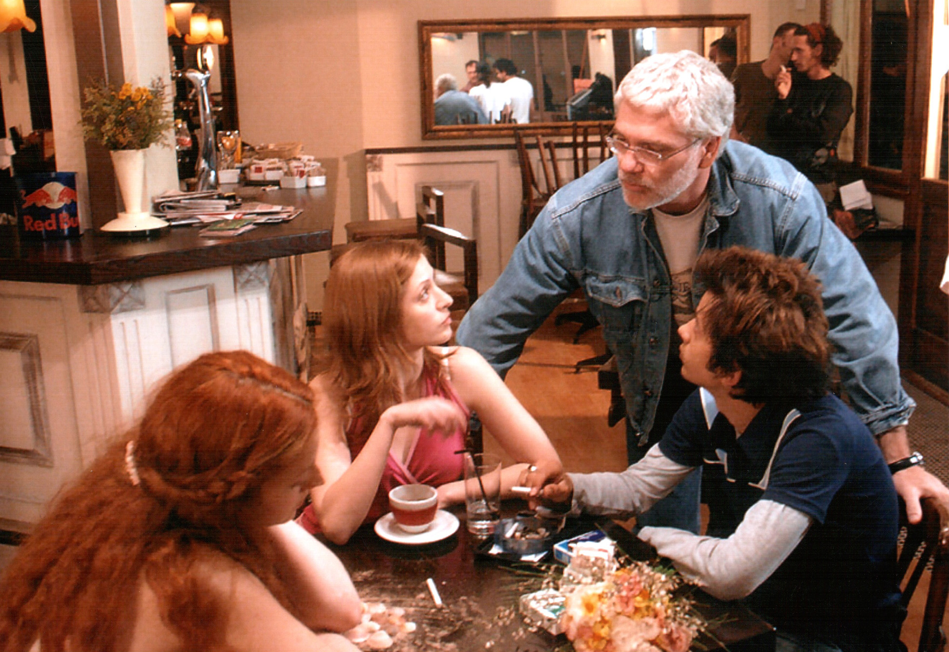 דורון ערן על הסט של הסרט "רגליים קרות", מביים את הילה וידור, ציון ברוך ואיריס פן ב"קפה מאיר" בת"א